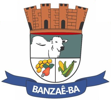 Brasão da cidade de Banzaê